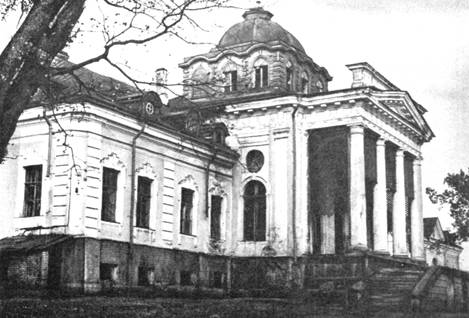 Elizavetino Villa near Gatchina